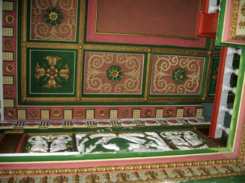 Інтэр'ер палаца ў Жылічах